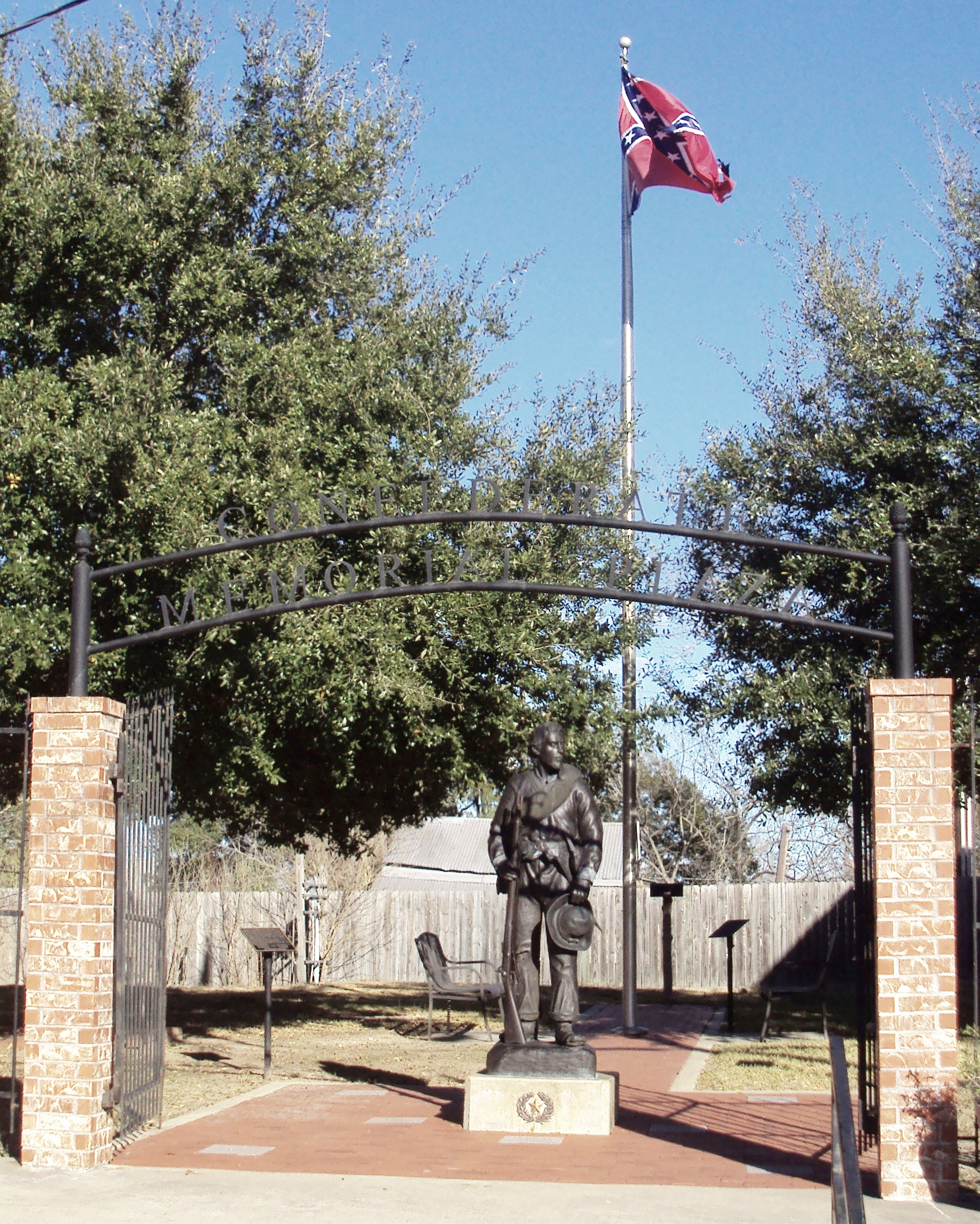 Confederate Memorial Plaza, Anderson, Texas.